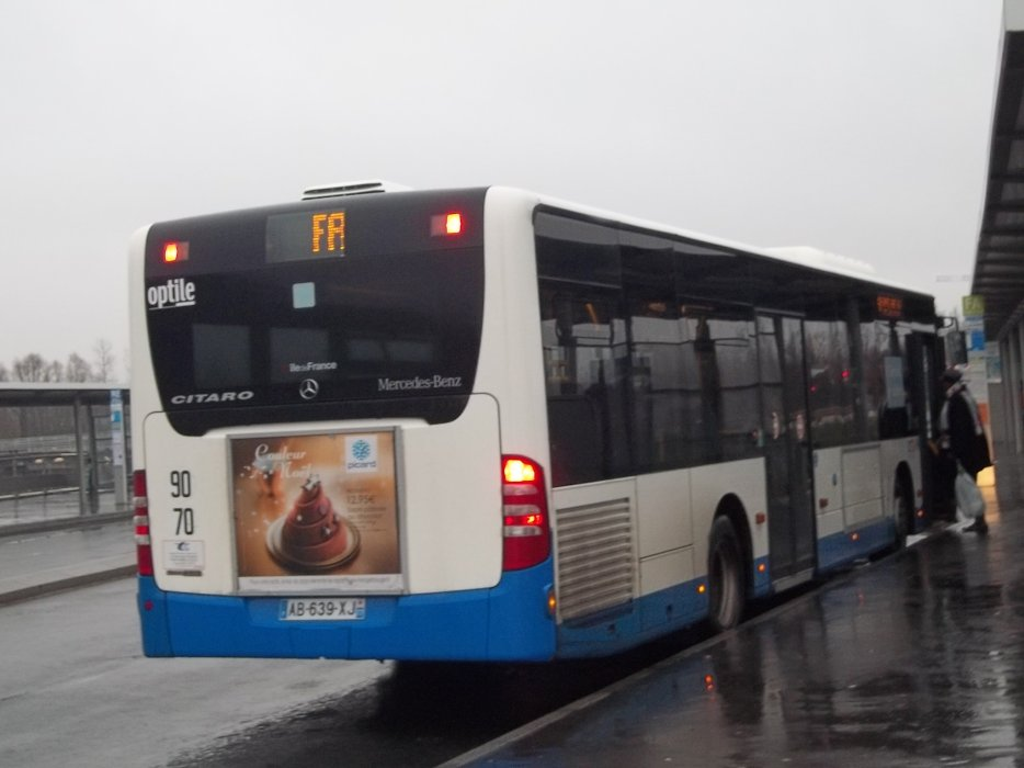 Mercedes - Benz Citaro Facelift en attente de départ sur la ligne FA à la Gare de Lieusaint - Moissy